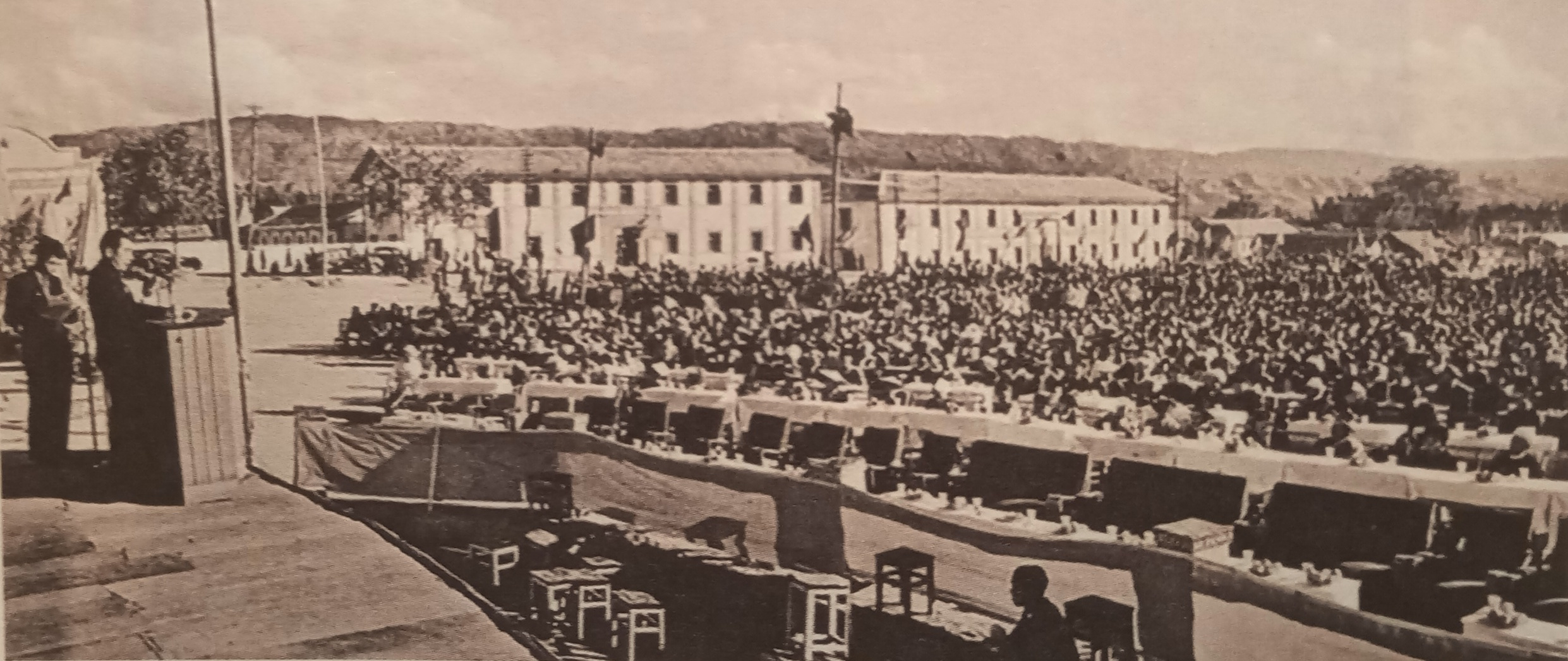 中文（中国大陆）: 1956年芒市中缅边民联欢大会